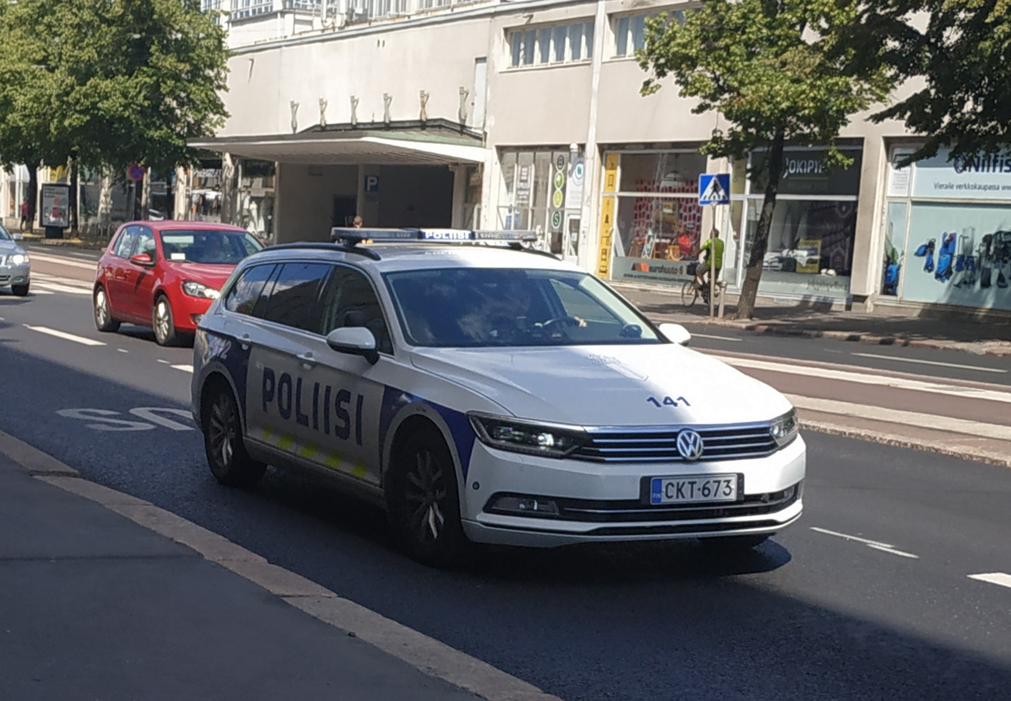 Volkswagen Passat de la police Finlandaise à Helsinki